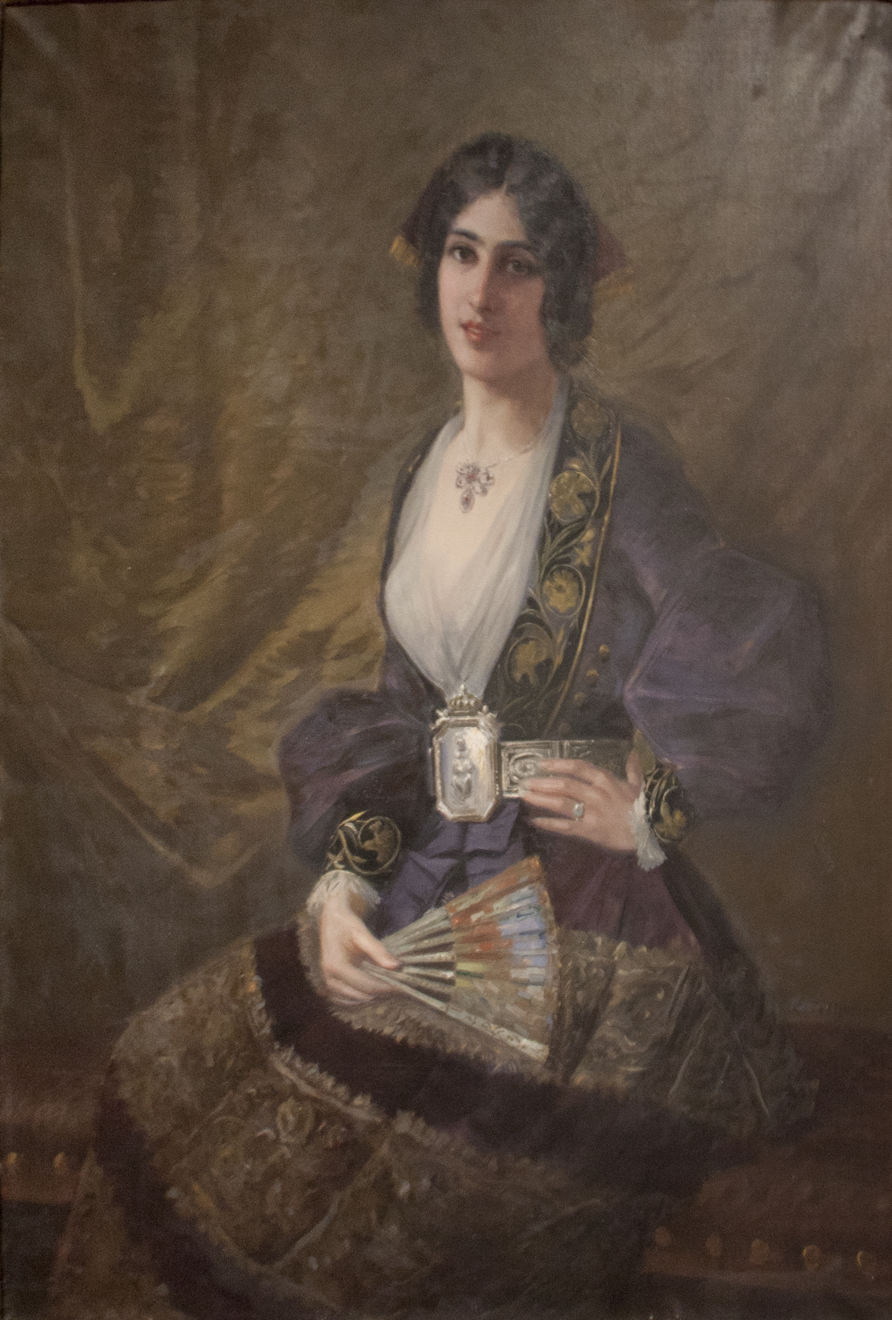 Donna di Sicilia in costume di Piana degli Albanesi - Ettore De Maria Bergler olio su tela 1933